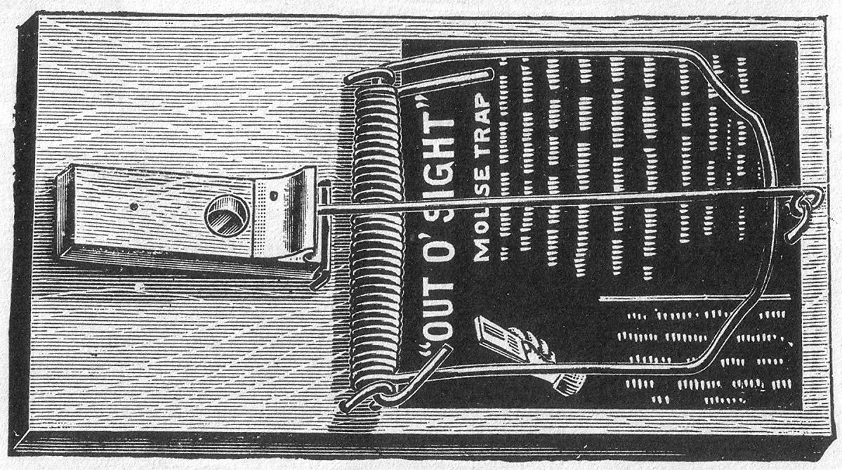 מלכודת עכברים, פרסומת מהמאה ה-19